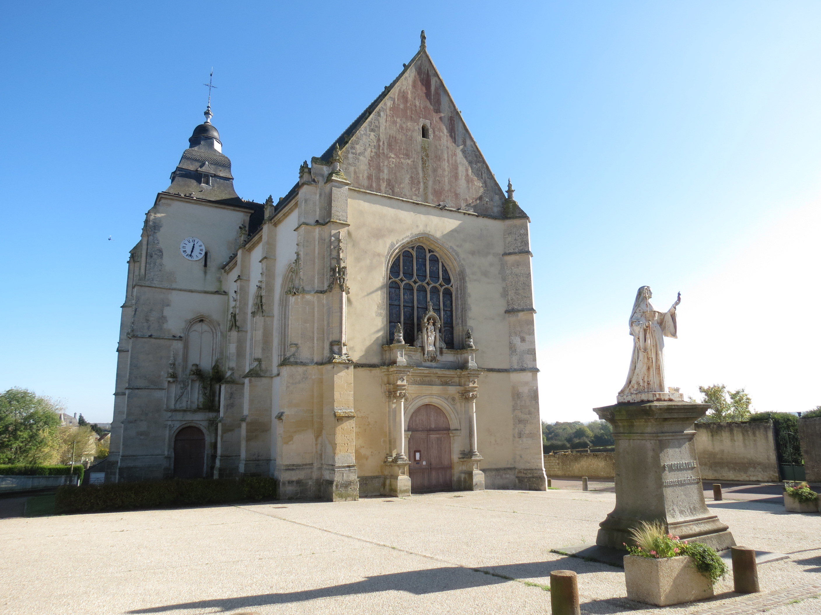 Eglise et statue à Almenêches